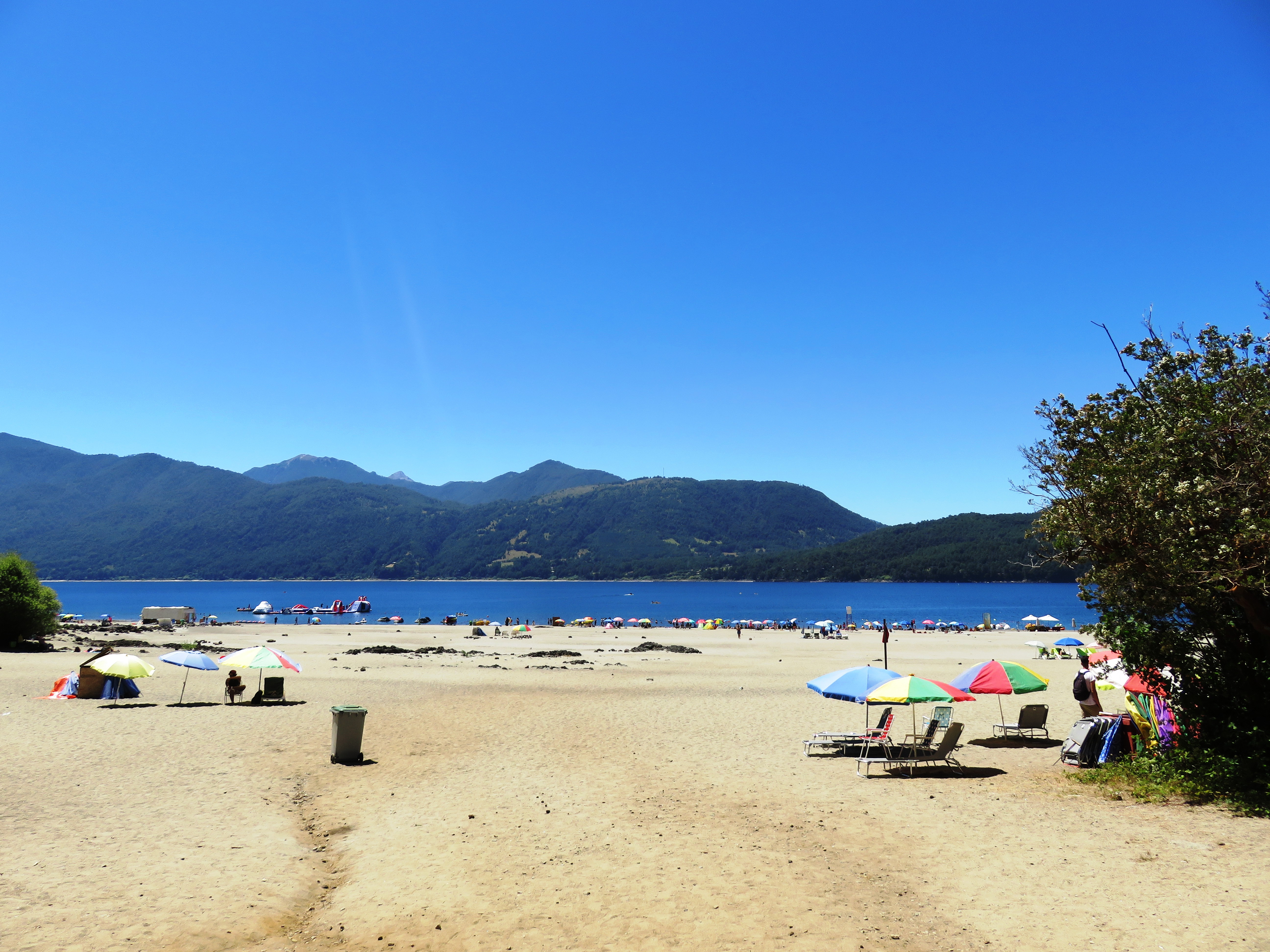 Lago Caburgua im südchilenischen Seengebiet, in der Nähe von Pucón